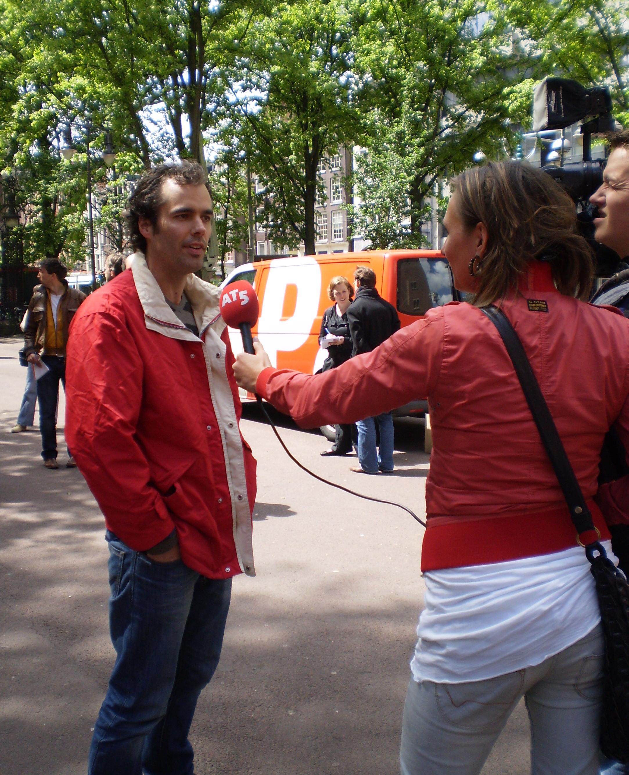 Amsterdams tv-station AT5 interviewt lokale SP-fractievoorzitter Laurens Ivens